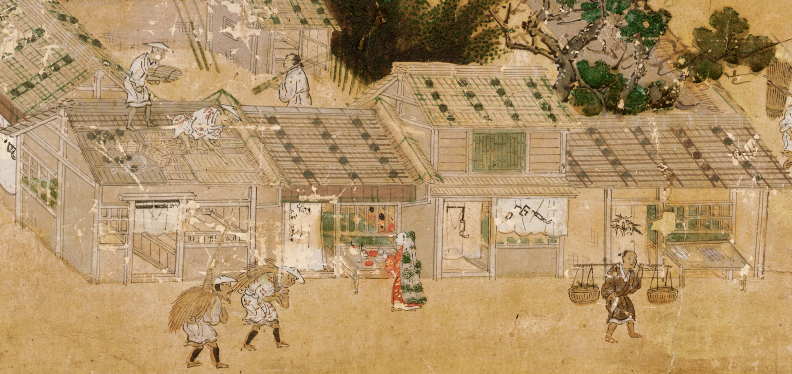 洛中洛外図屏風(歴博甲本)に描かれた室町時代末期の室町通りの町屋。